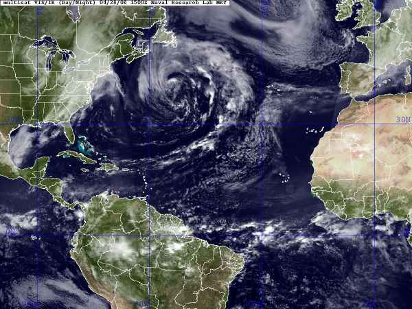 Cyclon Areil